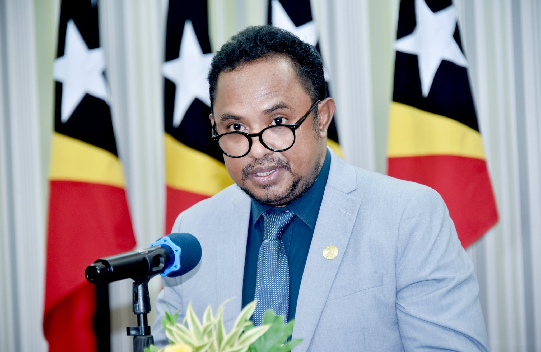 Arsénio Bano